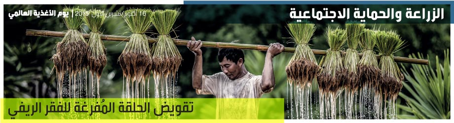 شعار يوم الأغذية العالمي لسنة 2015